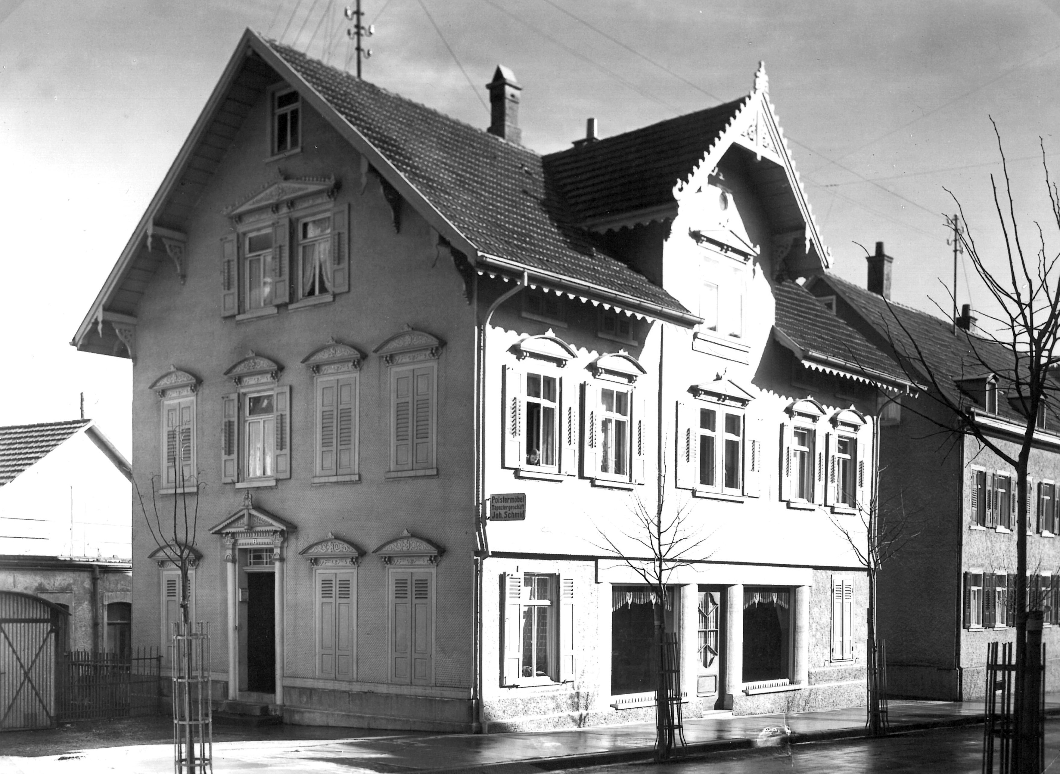 In diesem Haus in der Sonnenstraße in Albstadt-Ebingen begann die eigene Trikotwarenherstellung unter der Firma Hertler & Schäfer am 1. April 1893